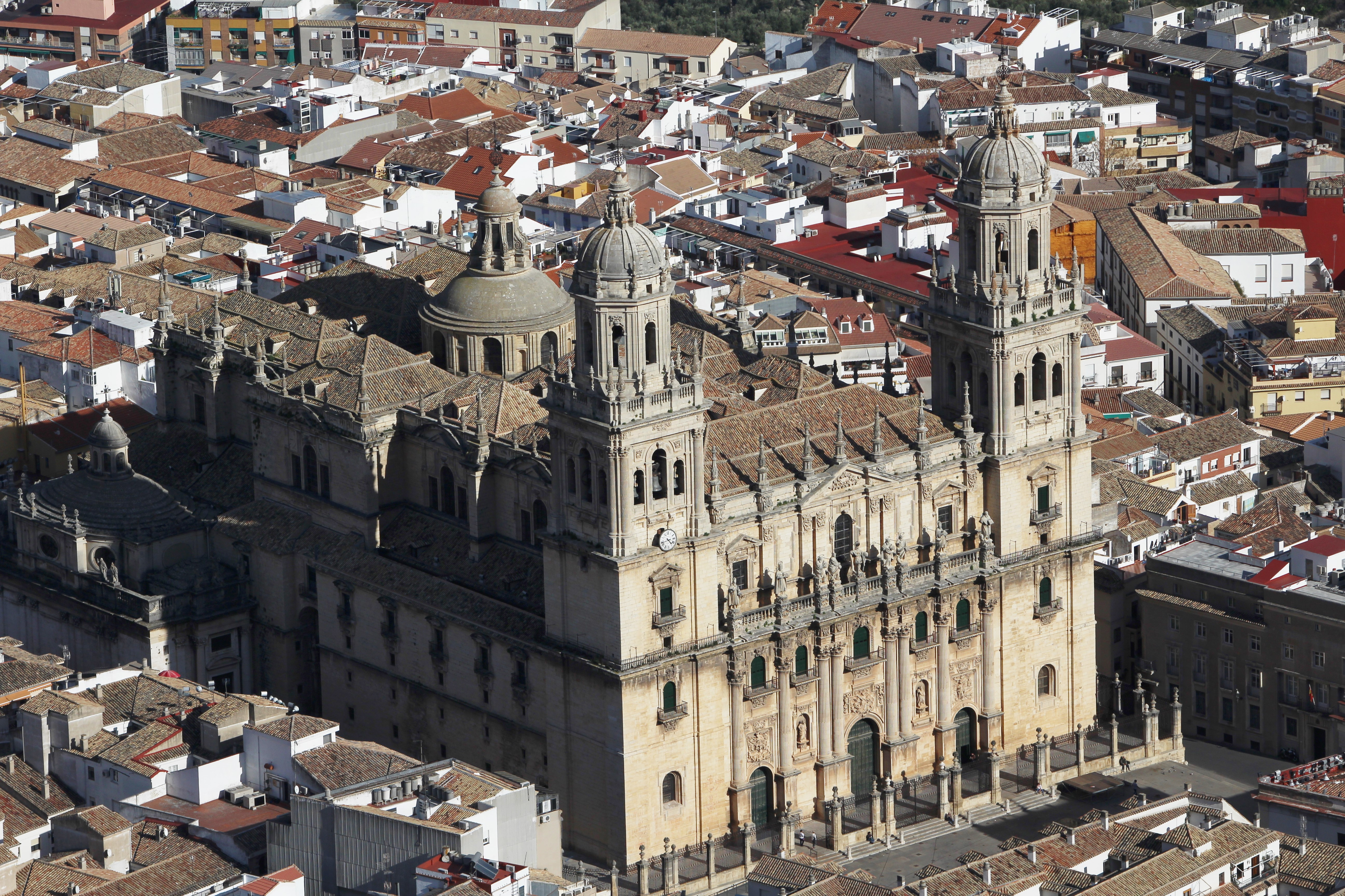 Vista superior de la catedral de Jaén desde la cruz del castillo de Santa Catalina. ID RI-51-0000645